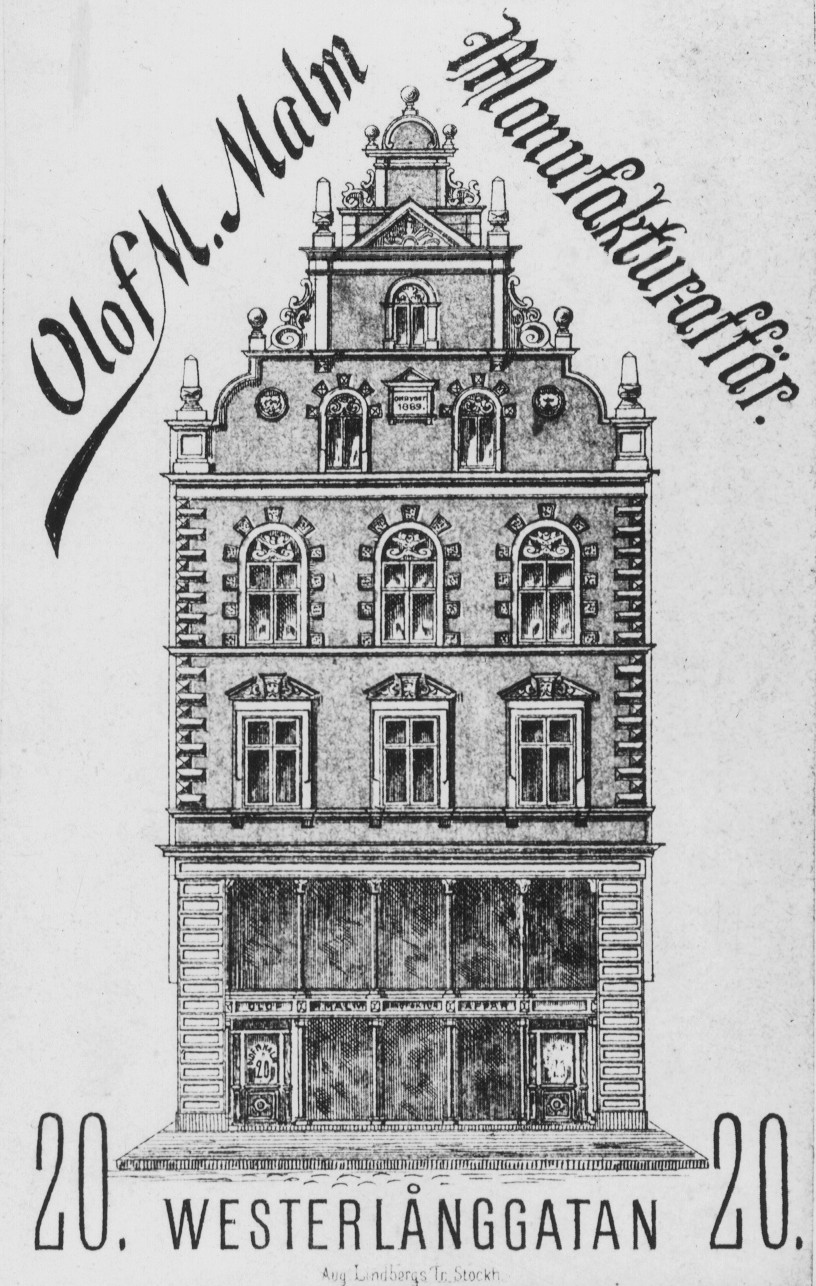 Reklam för Olof M. Malms manufakturaffär, Västerlånggatan 20